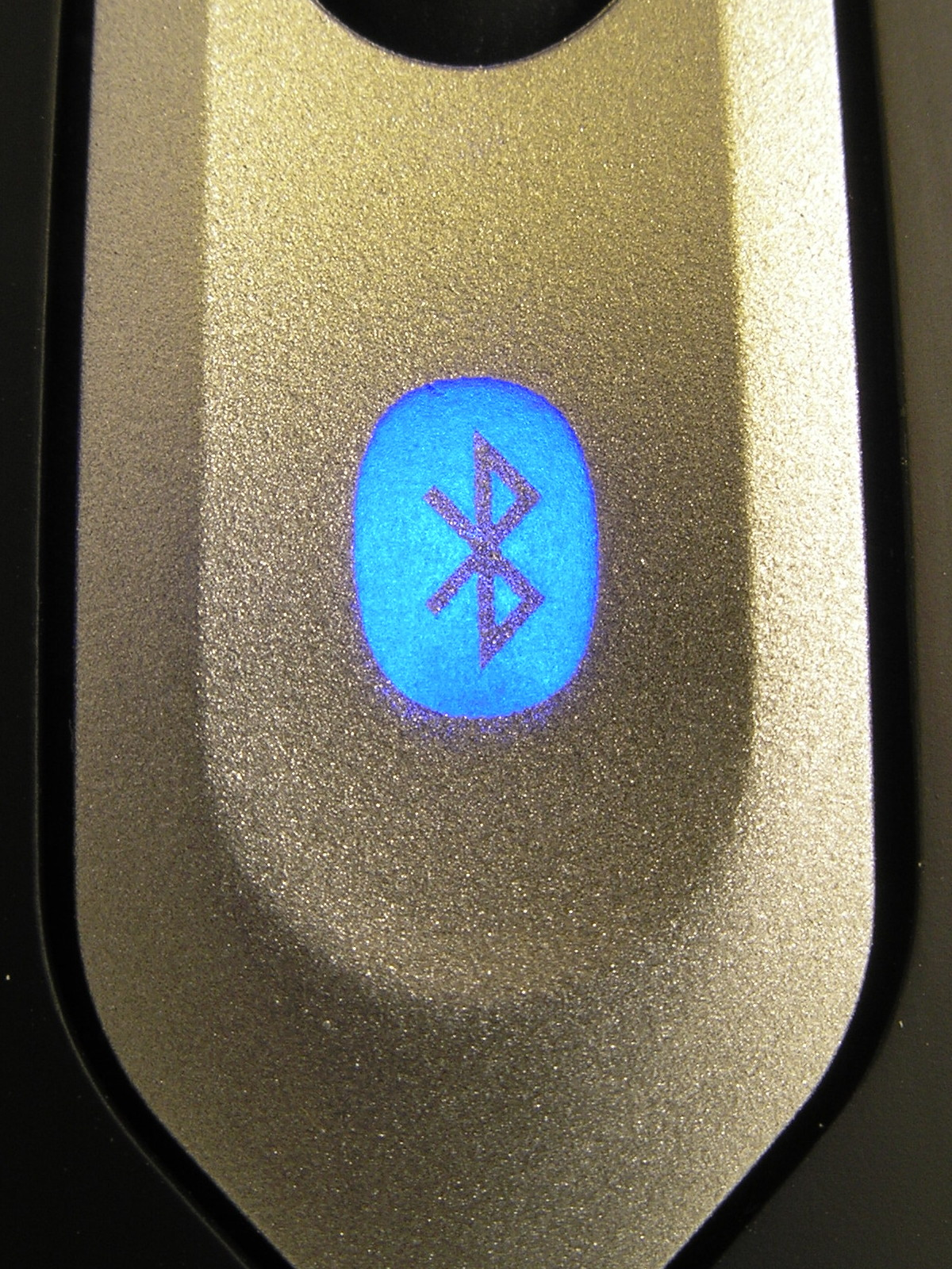 Bluetooth-Logo auf einer Maus